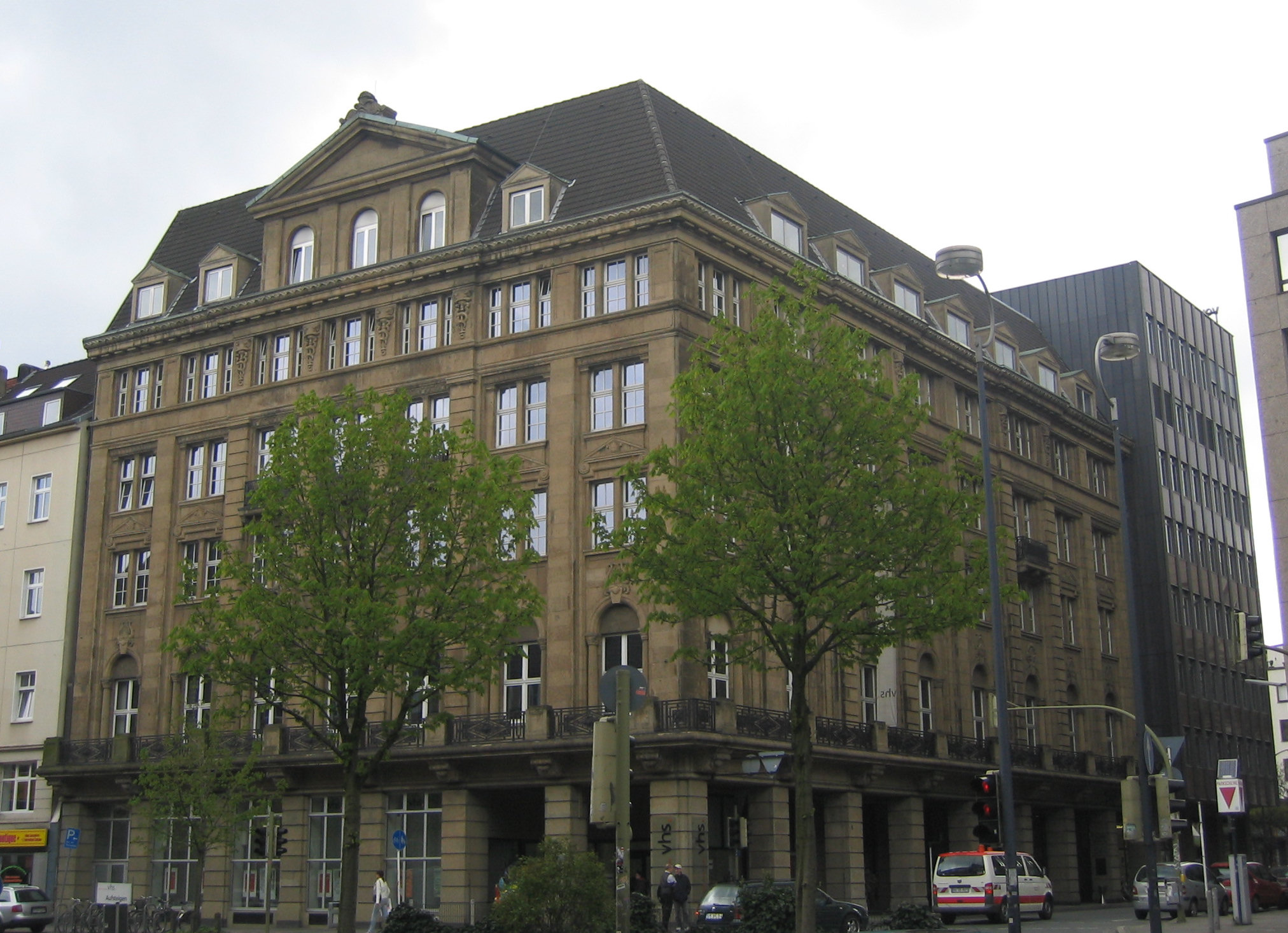 Volkshochschule Dortmund, ehemaliges Elite-Cafe Löwenhof